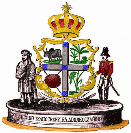 Armoiries du Ranavalona II